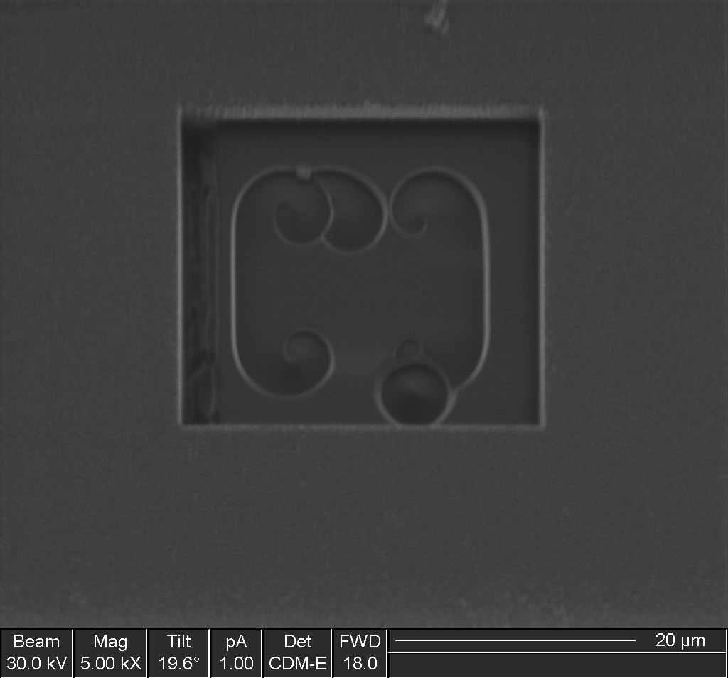 Artefakt in reinem Magnesium nach Galium-Ionenbeschuss